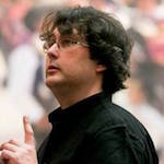 Raúl Mallavibarrena mientras dirige a Musica Ficta en un concierto en la Hispanic Society of America de Nueva York